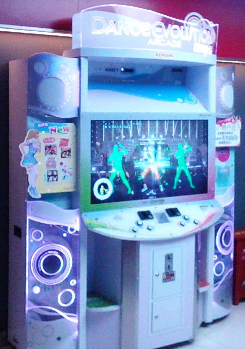 DANCE EVOLUTION中国大陆版（舞蹈进化）机台照片。